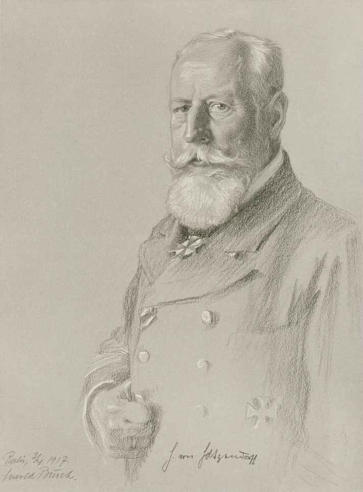 Henning von Holtzendorff en 1917